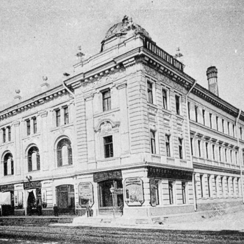 Здание Сандуновских бань